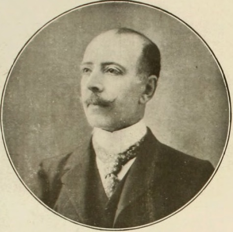 Javier Ángel Figueroa Larraín (Santiago de Chile, 17 de enero de 1862 - Santiago de Chile, 26 de junio de 1945) fue un abogado y político chileno, hermano mayor del presidente Emiliano Figueroa.